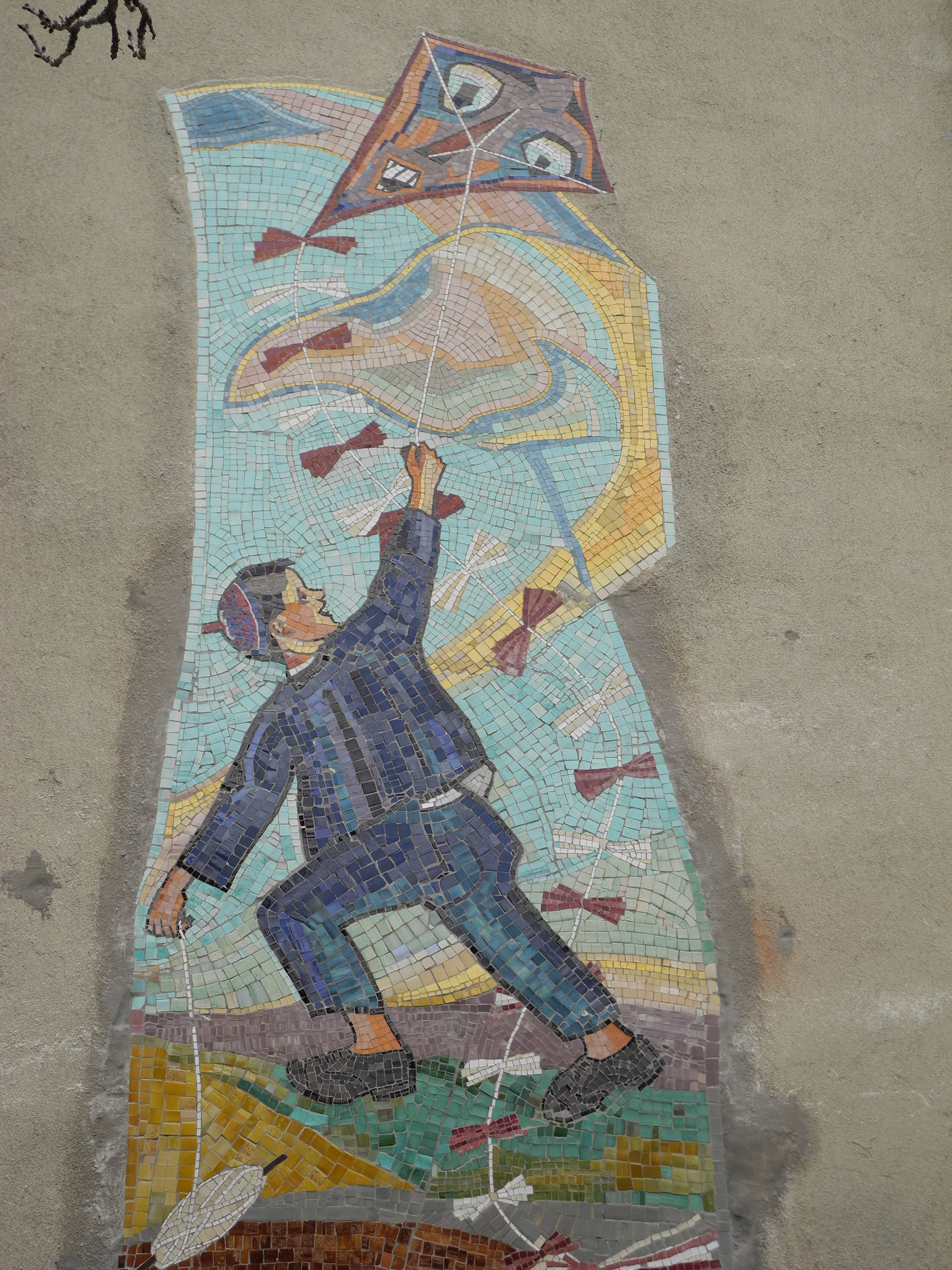 Kunst-am-Bau, Figuren und Keramikreliefs, Drachensteigen